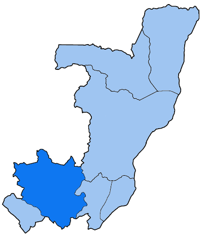 Mappa della diocesi cattolica di Nkayi, nella Repubblica del Congo.